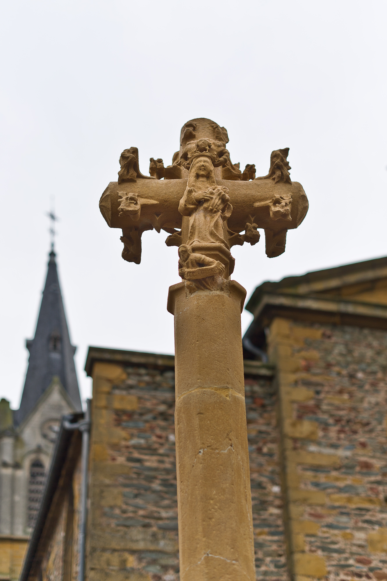 Croix de Sourcieux-les-Mines, Place de l'Église (Inscrit, 1926) .